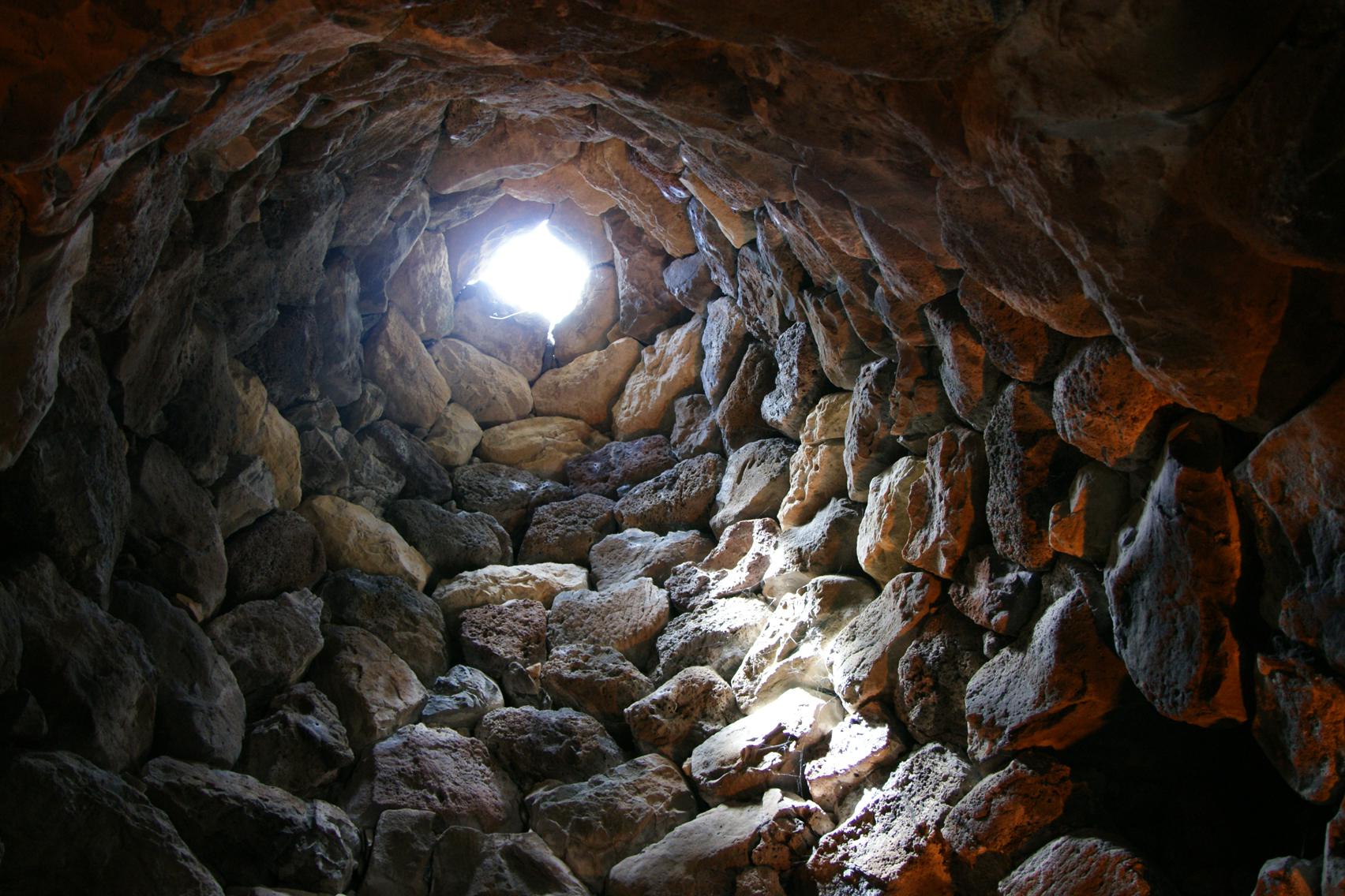 Dettaglio di copertura del Nuraghe